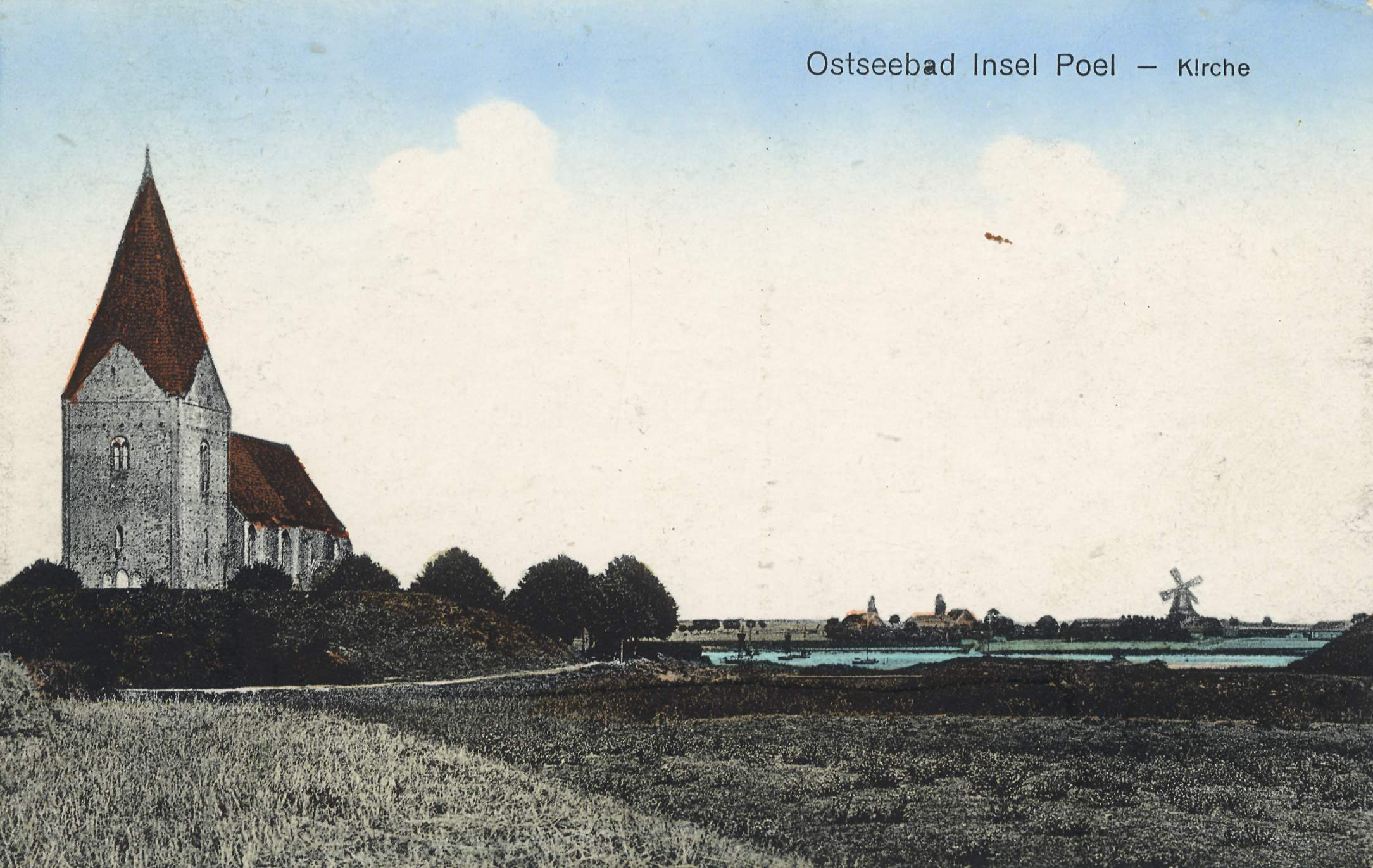 Ostseebad Insel Poel — Kirche